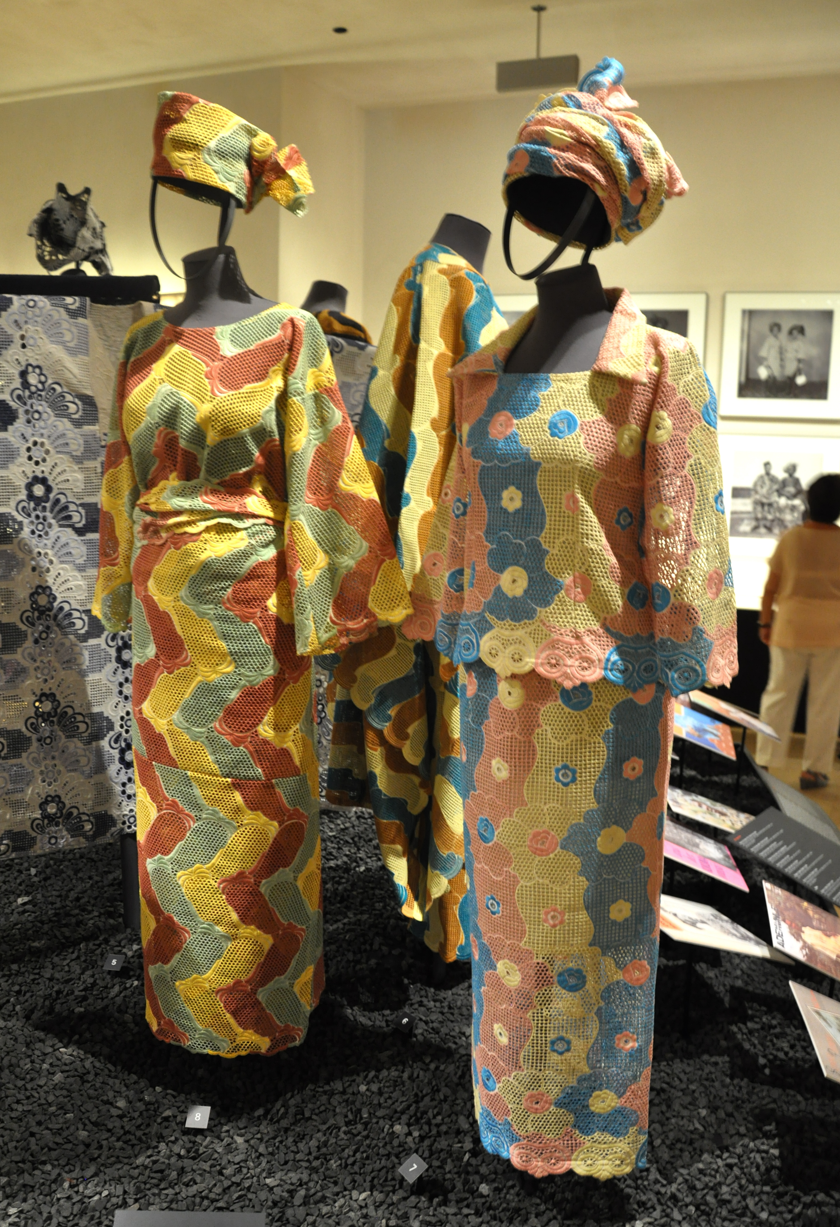 Links: Dreiteiliges Damenkostüm, Nigeria, frühe 1970er Jahre; Baumwollstoff mit industrieller Lochstickerei; Vorarlberg Museum, Inv. Nr. Tr 2089 Rechts: Dreiteiliges Damenkostüm „Up and down“ mit „Gele“ (Kopftuch); Ibadan, Nigeria, frühe 1970er Jahre; Lochstickerei auf Baumwollstoff, gefüttert; Weltmuseum Wien, Inv. Nr. 187.511 a,b,c Fotografiert in der Ausstellung Lustenau Lagos African Lace im Vorarlberg Museum, Bregenz.